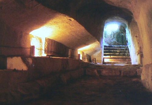 Interior del castell de Sant Felip, a Menorca.